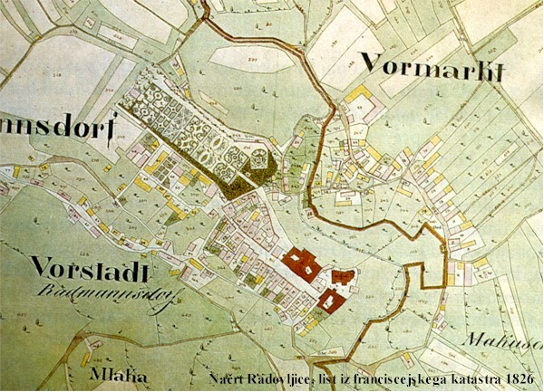 Radovljica na franciscejskem katastru 1826.